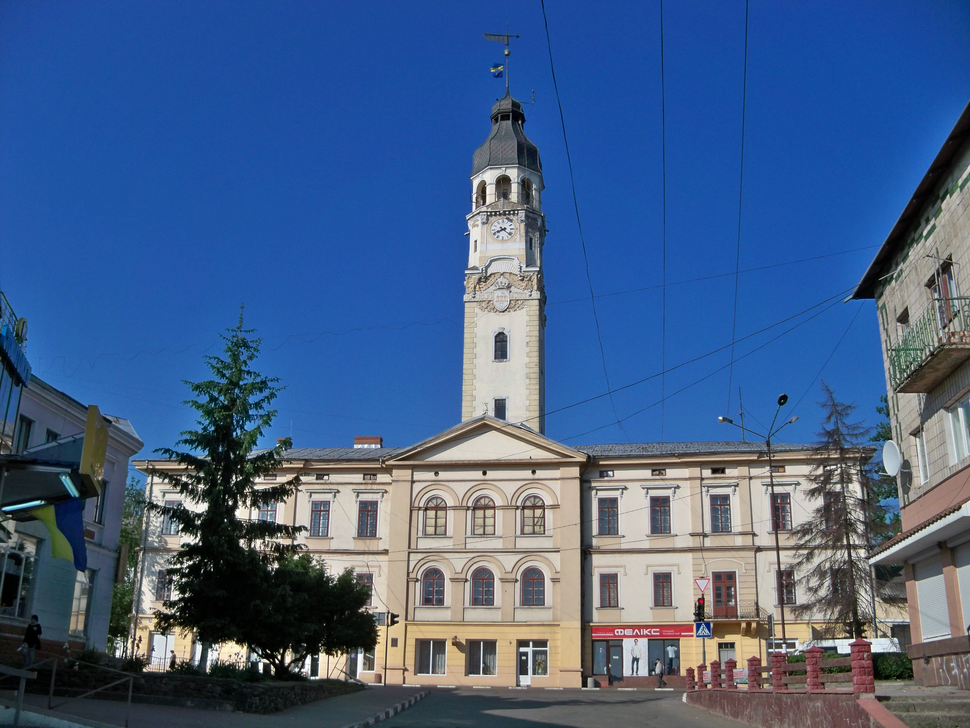 Ратуша (мур.), Снятин, вул. Шевченка, 70